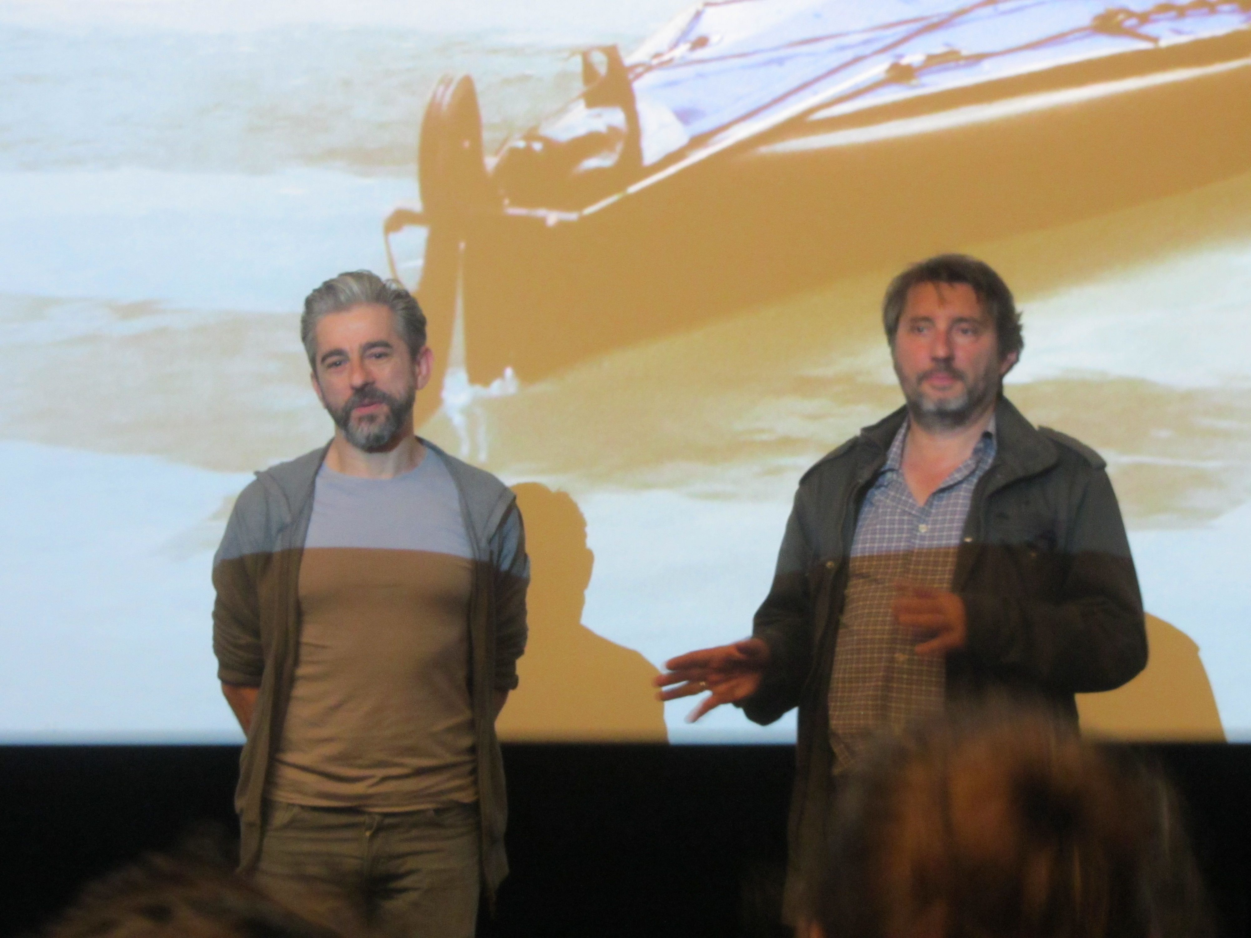 Avant première de Comme un avion à l'UGC Paris 19, Jean-Noël Brouté et Bruno Podalydès